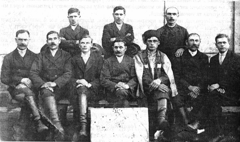 Чоловічий хор «Просвіти»